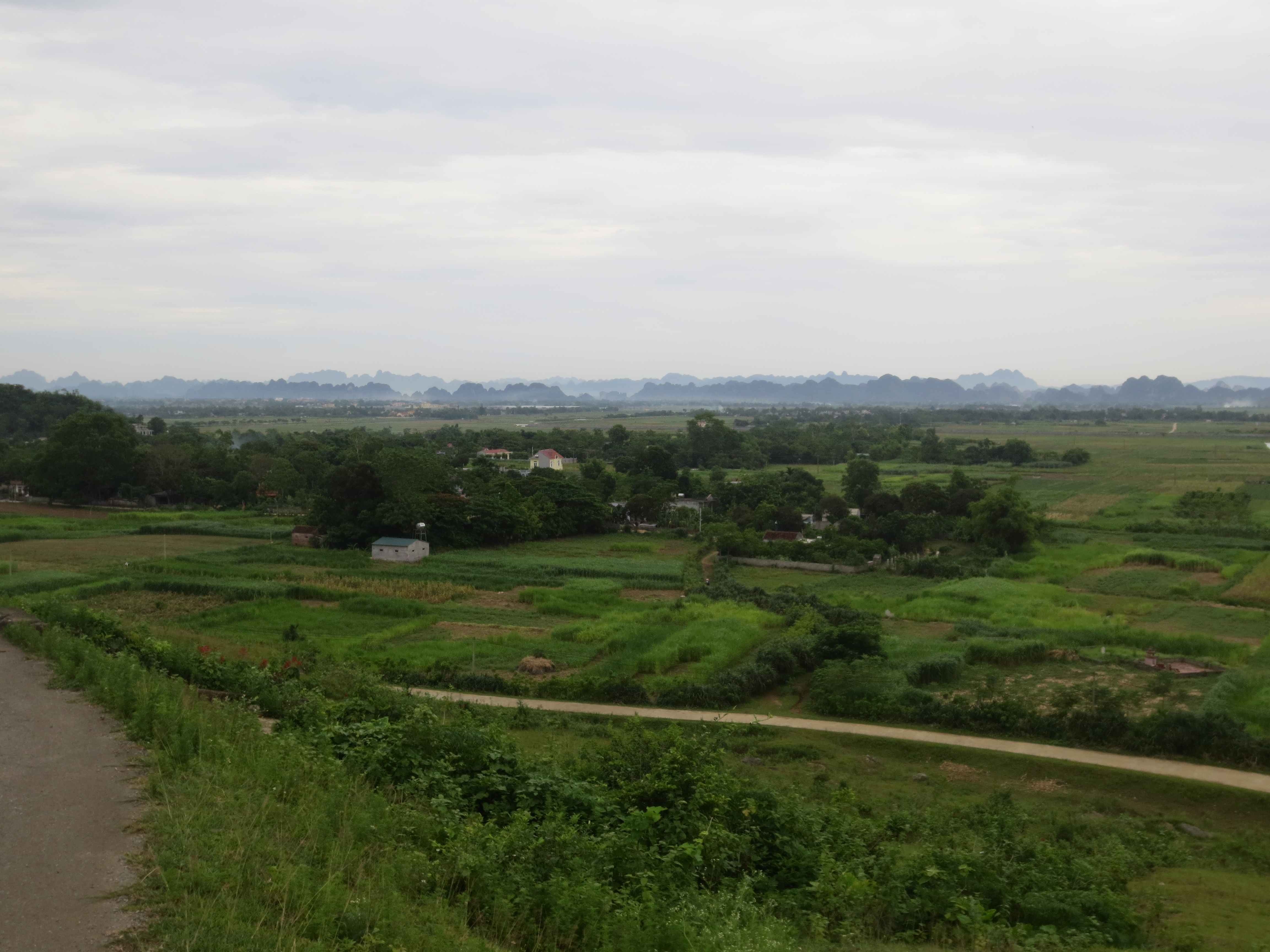 Phong cảnh làng Bồng Lai, Ninh Bình - Quê hương của Cô Đôi Thượng Ngàn nhìn từ dốc Sườn Bò